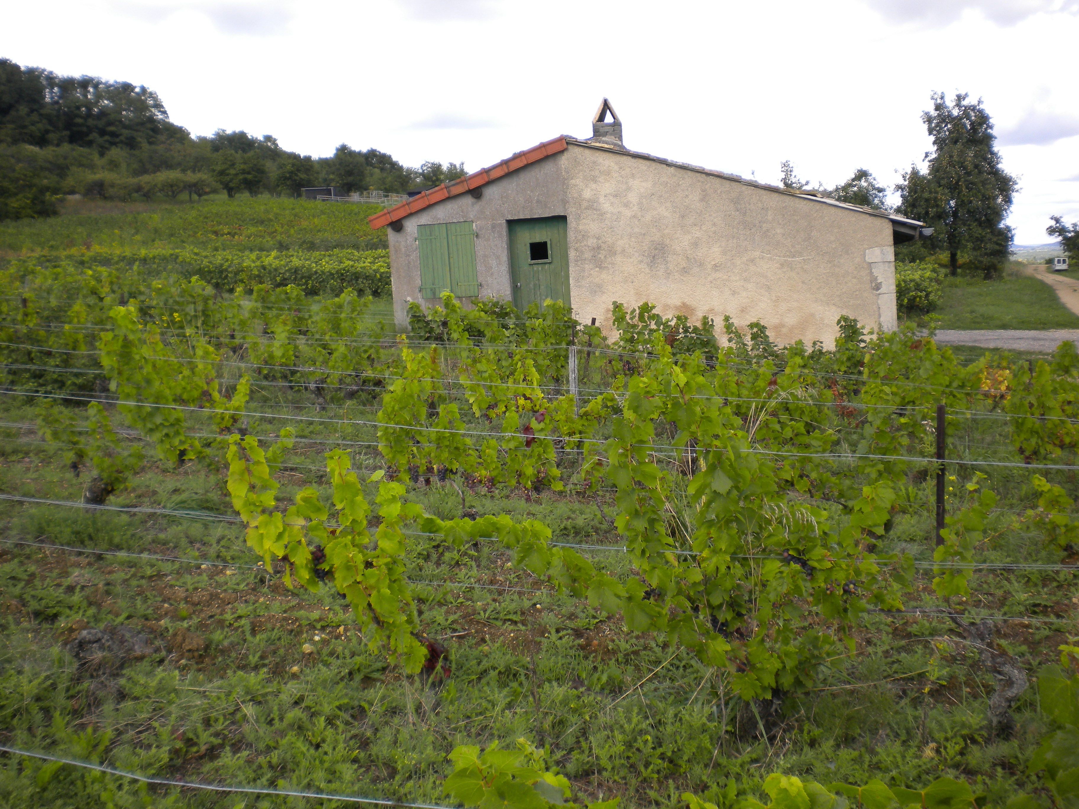 Photographie de la partie nord du vignoble de Bulligny, Rue des Vignes, à Bulligny, Meurthe-et-Moselle, Lorraine, France.